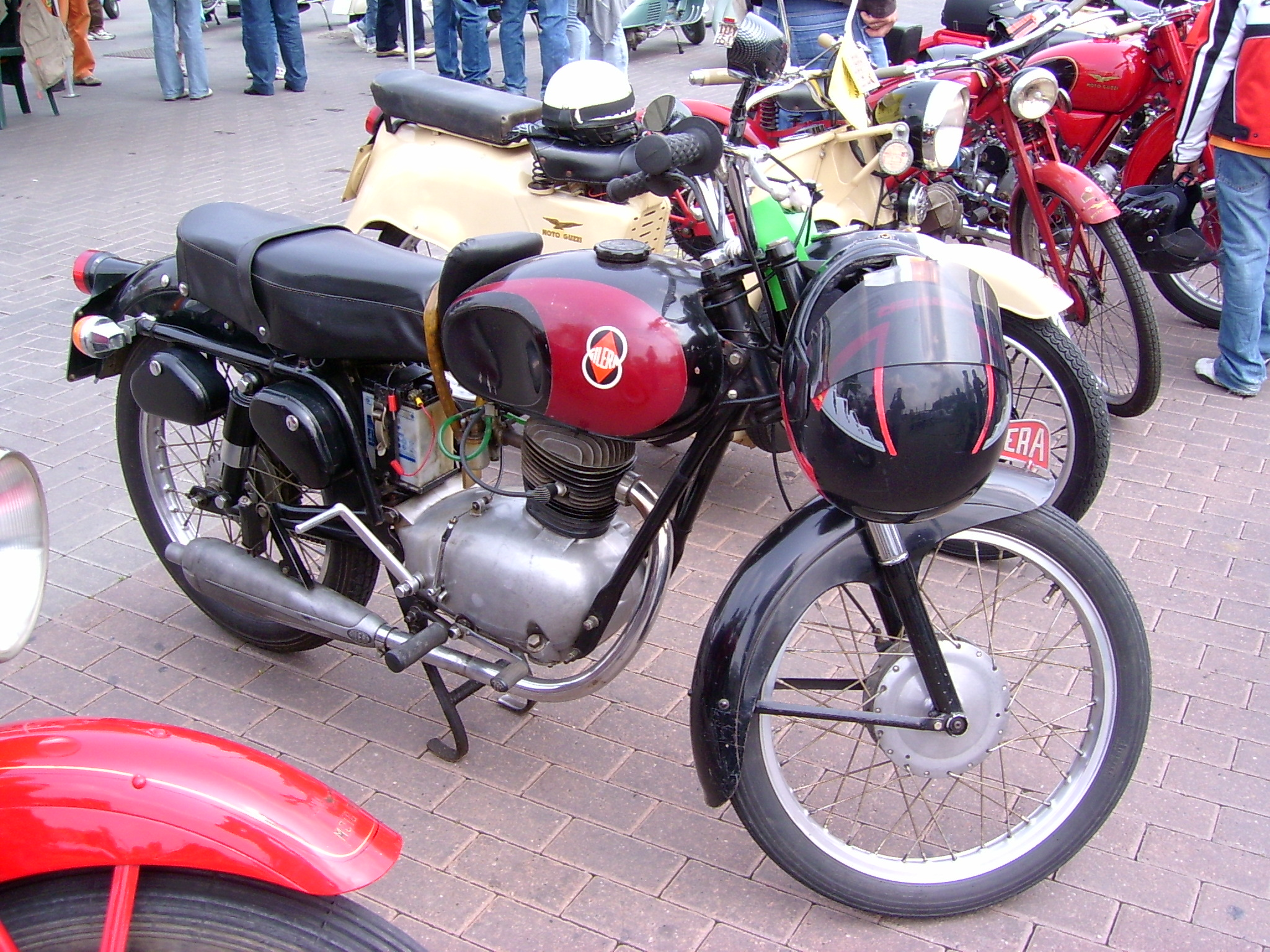 Foto scattata a Leinì per la festa del primo Maggio